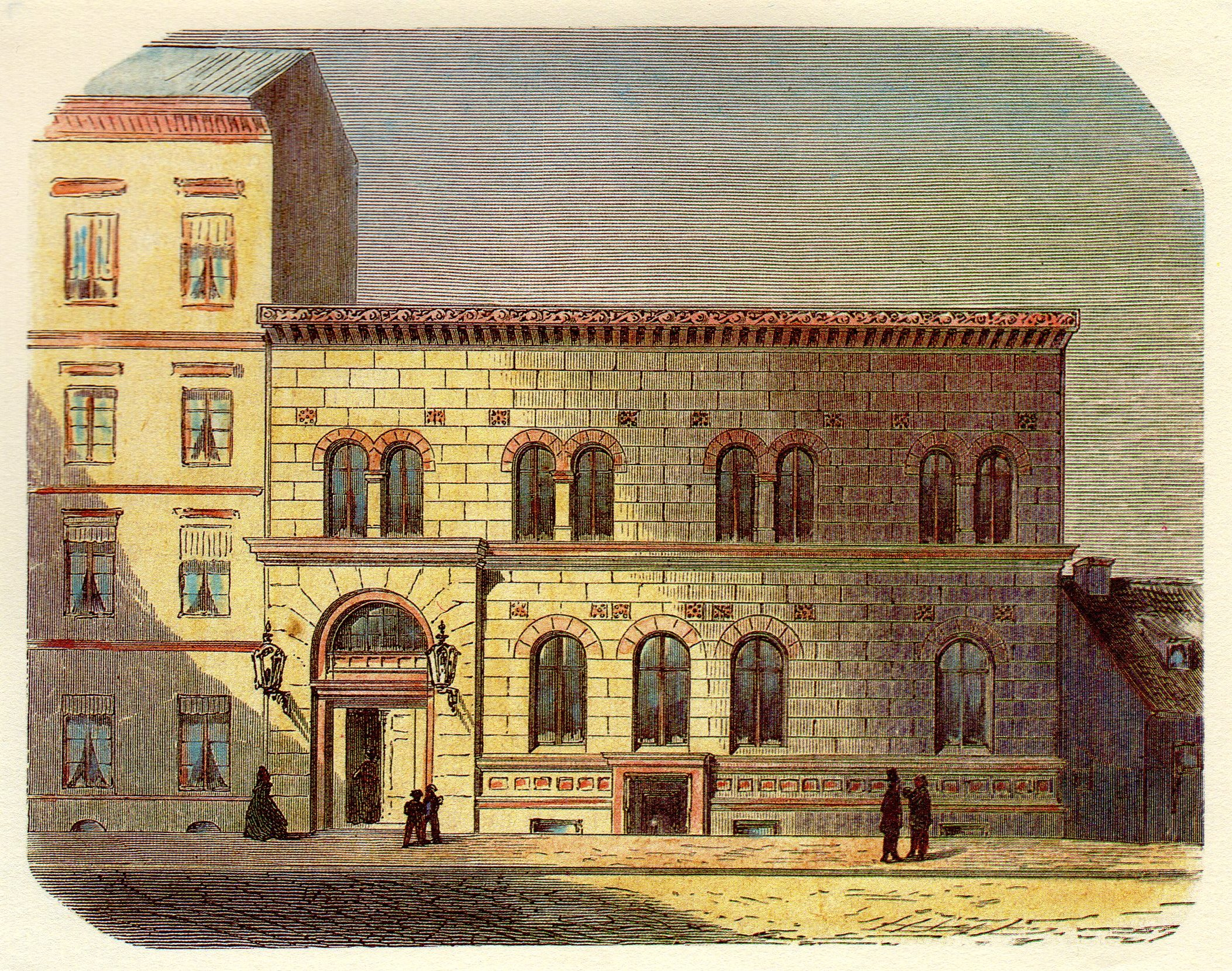 Das Haus des Berliner Handwerkervereins in der Sophienstraße 15, Holzstich nach einer Zeichnung von Hänschel